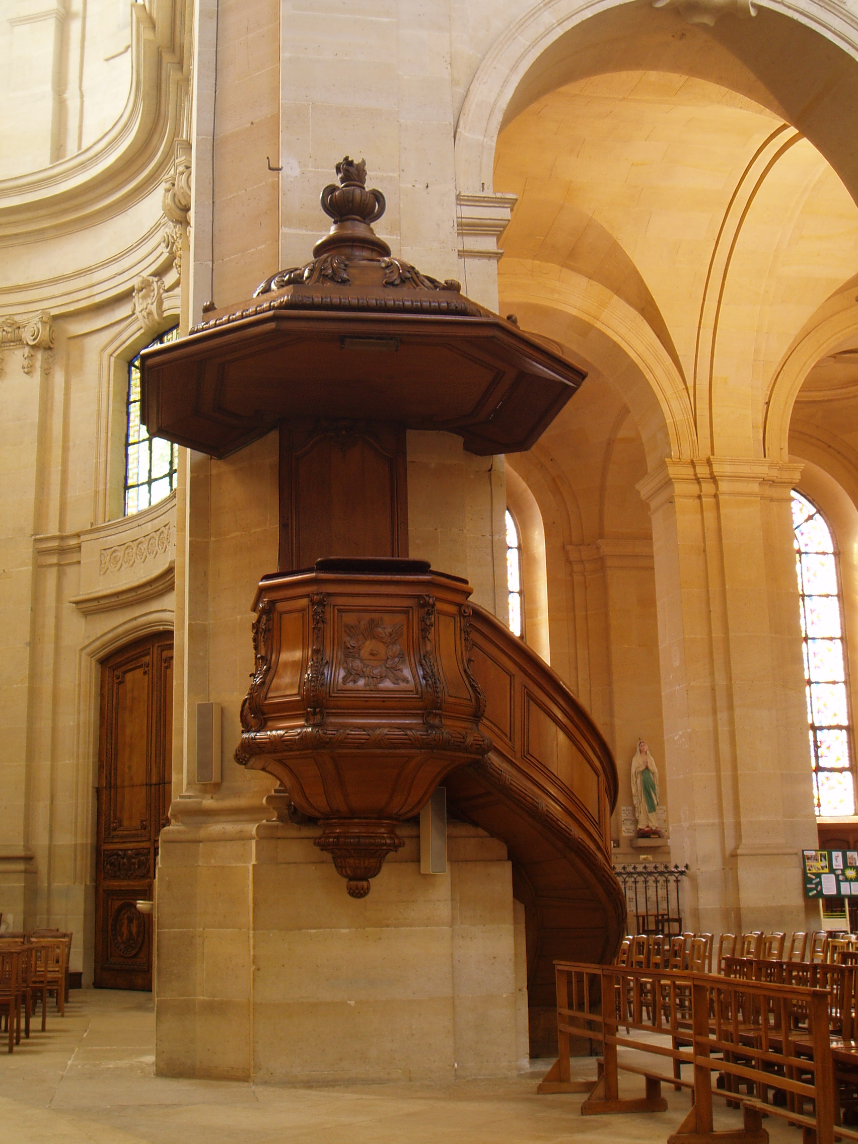 Voute de la nef Chaire, contemporaine de la construction de l'édifice. Cathédrale Saint Louis de Versailles Architecte : Jules Hardouin Mansart de Sagonne Construction : 12 juin 1743 Inauguration : 24 août 1754 consacrée cathédrale en 1843